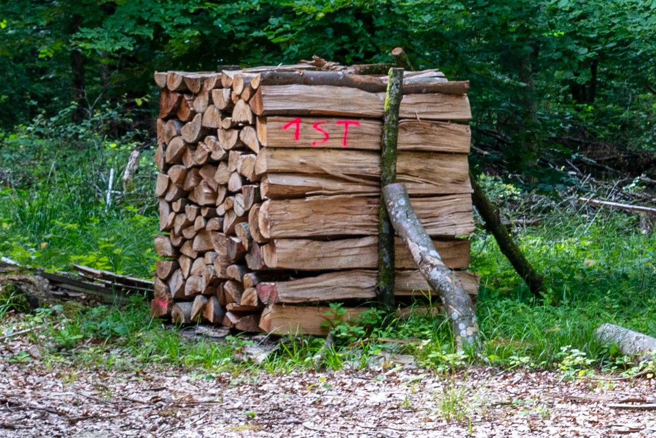 Am «Fremholz» zu Bäerdref. Ee Ster / eng hallef Kouert.